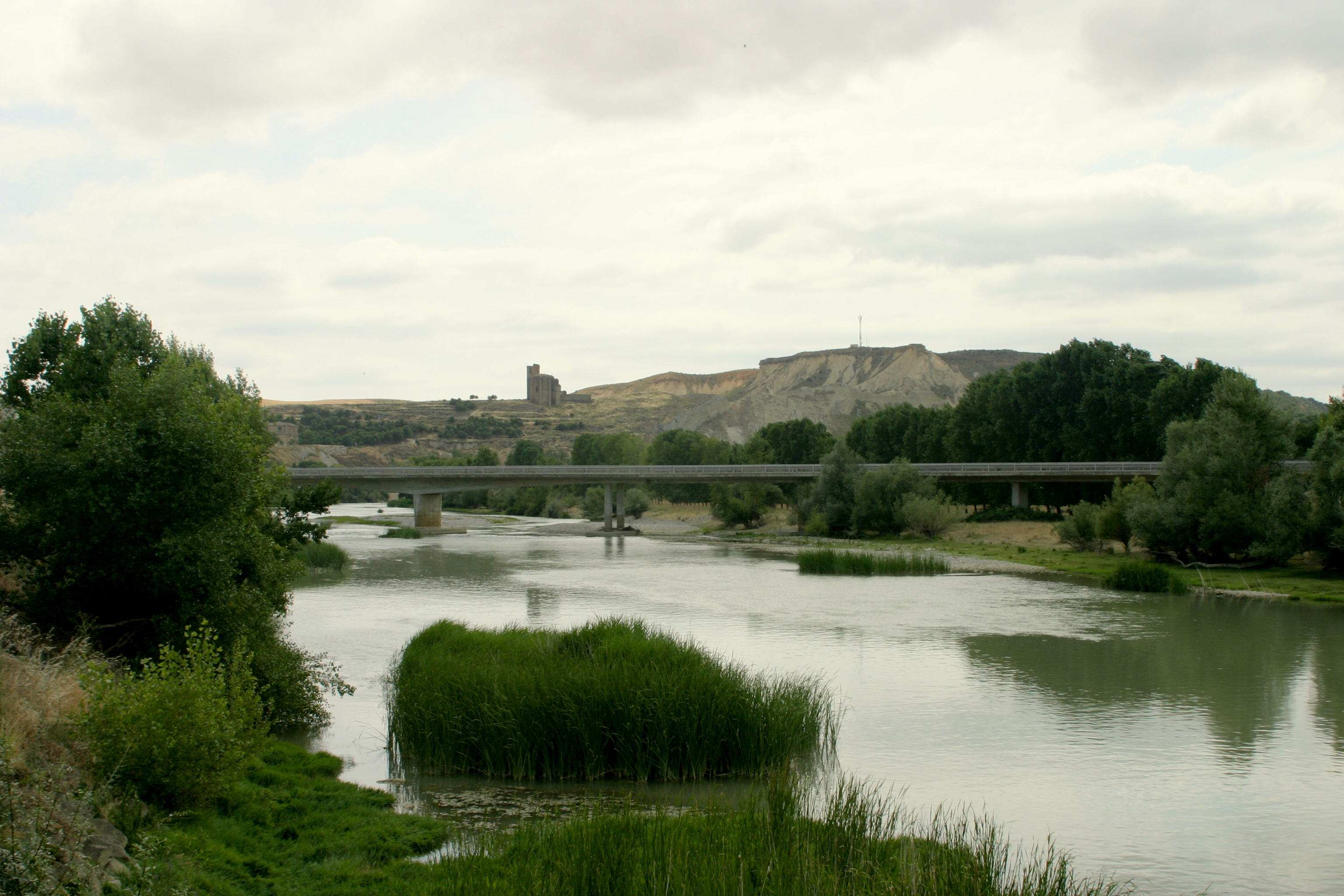 Aragoi ibaia Caparrosotik gertu.